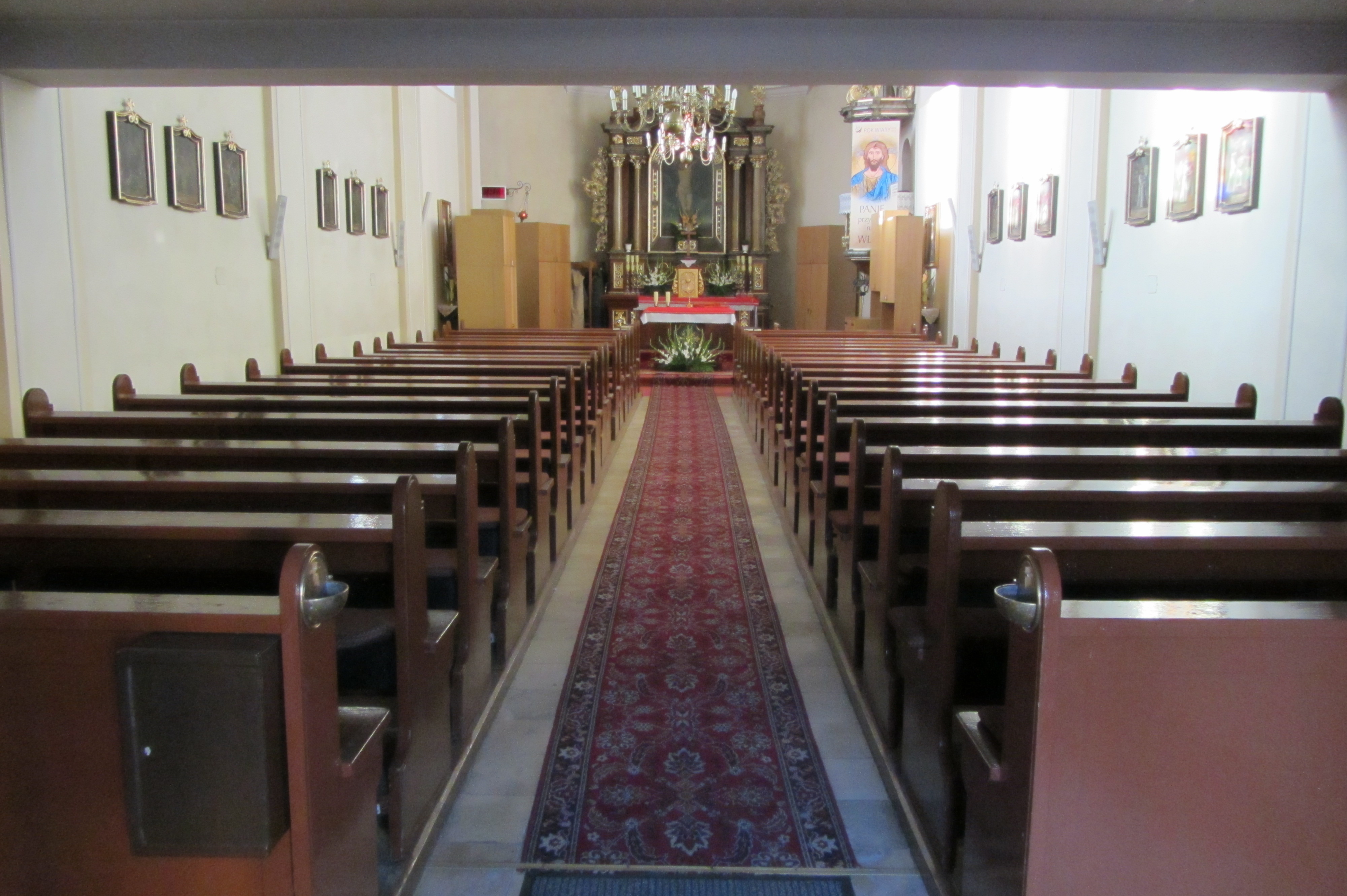 Blick in den Innenraum der St. Sebastians Kirche in Oppeln